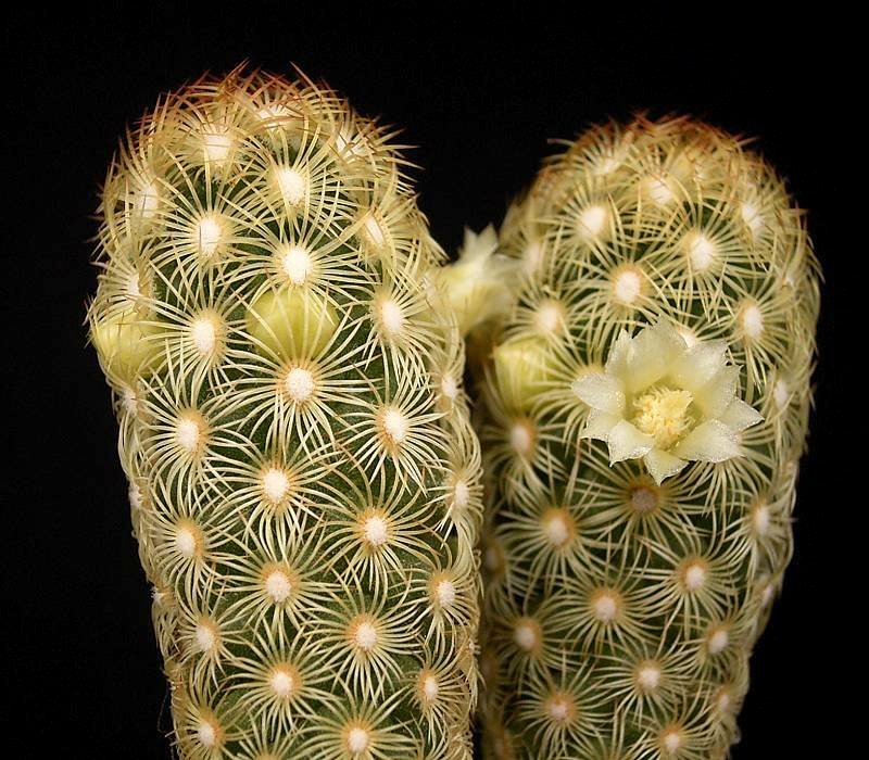 Mammillaria elongata var. stella-aurata